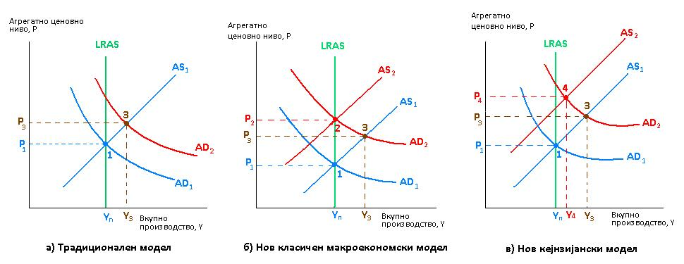 дијаграм